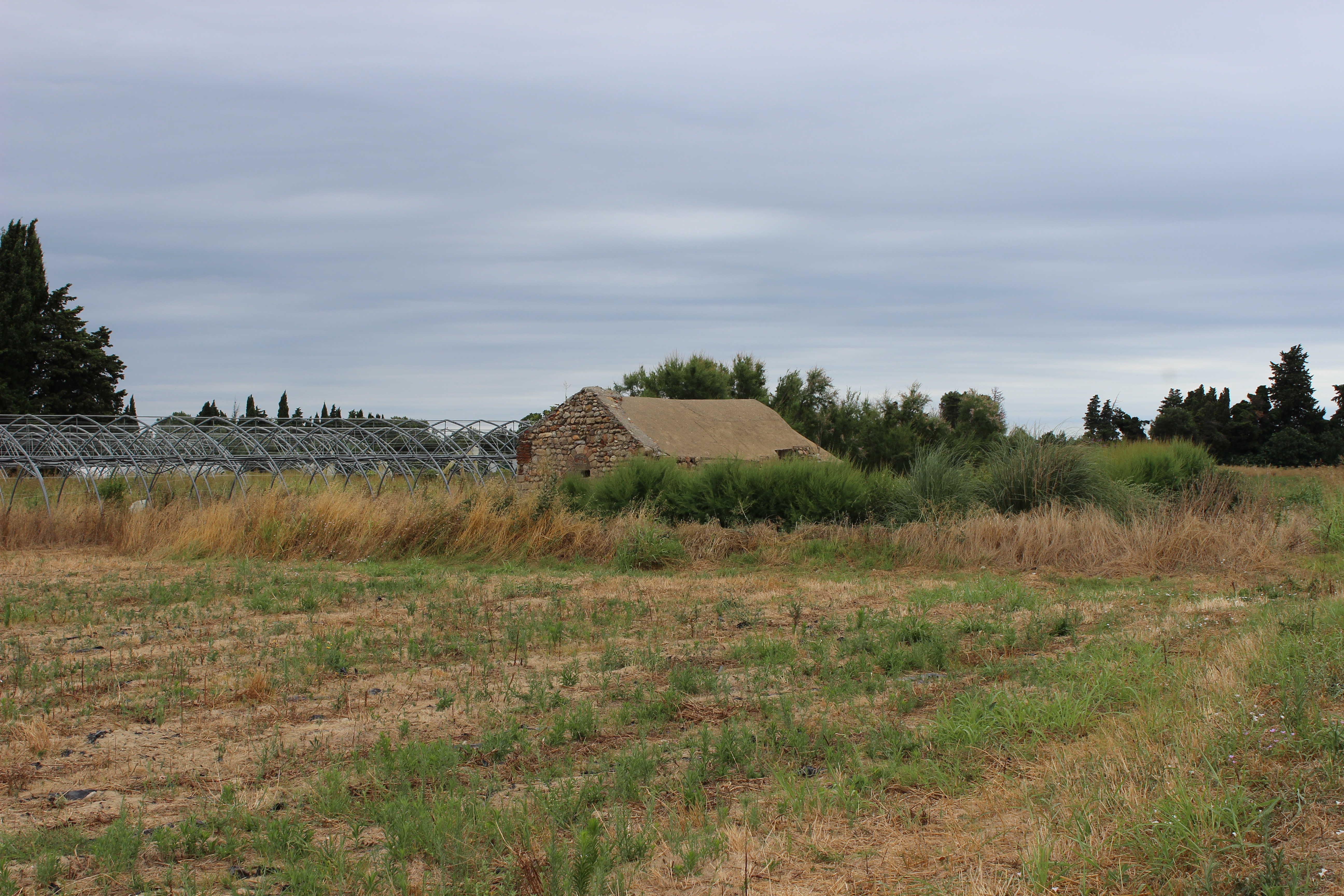 Église Sainte-Eugénie de Tresmals de loin